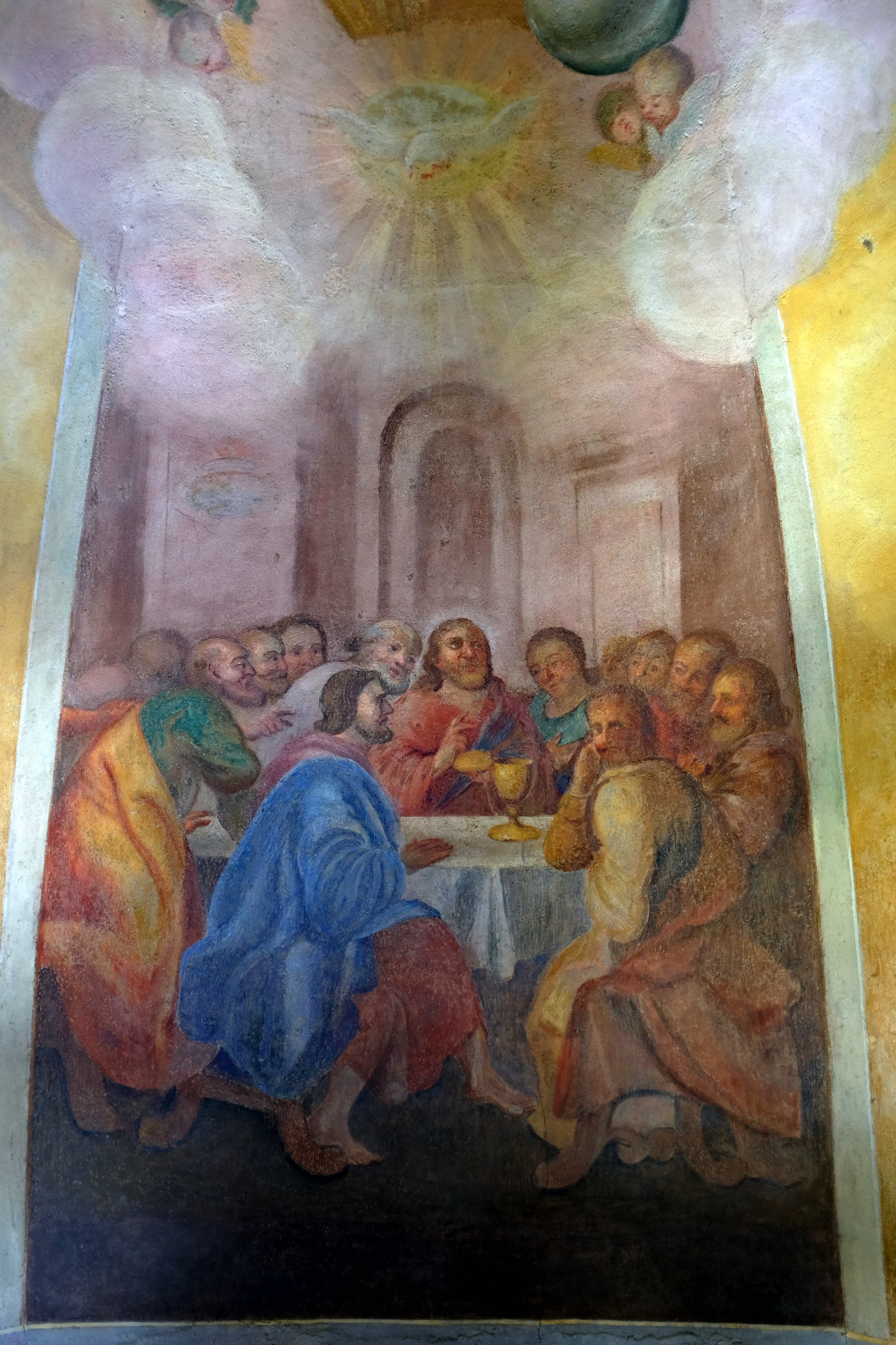 Kaple Božího Těla, Kostelní, pp. 587, u čp. 169, Horní Slavkov.